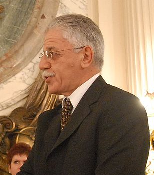 Juan Carlos tedesco, ministro de educación de Argentina desde 2007